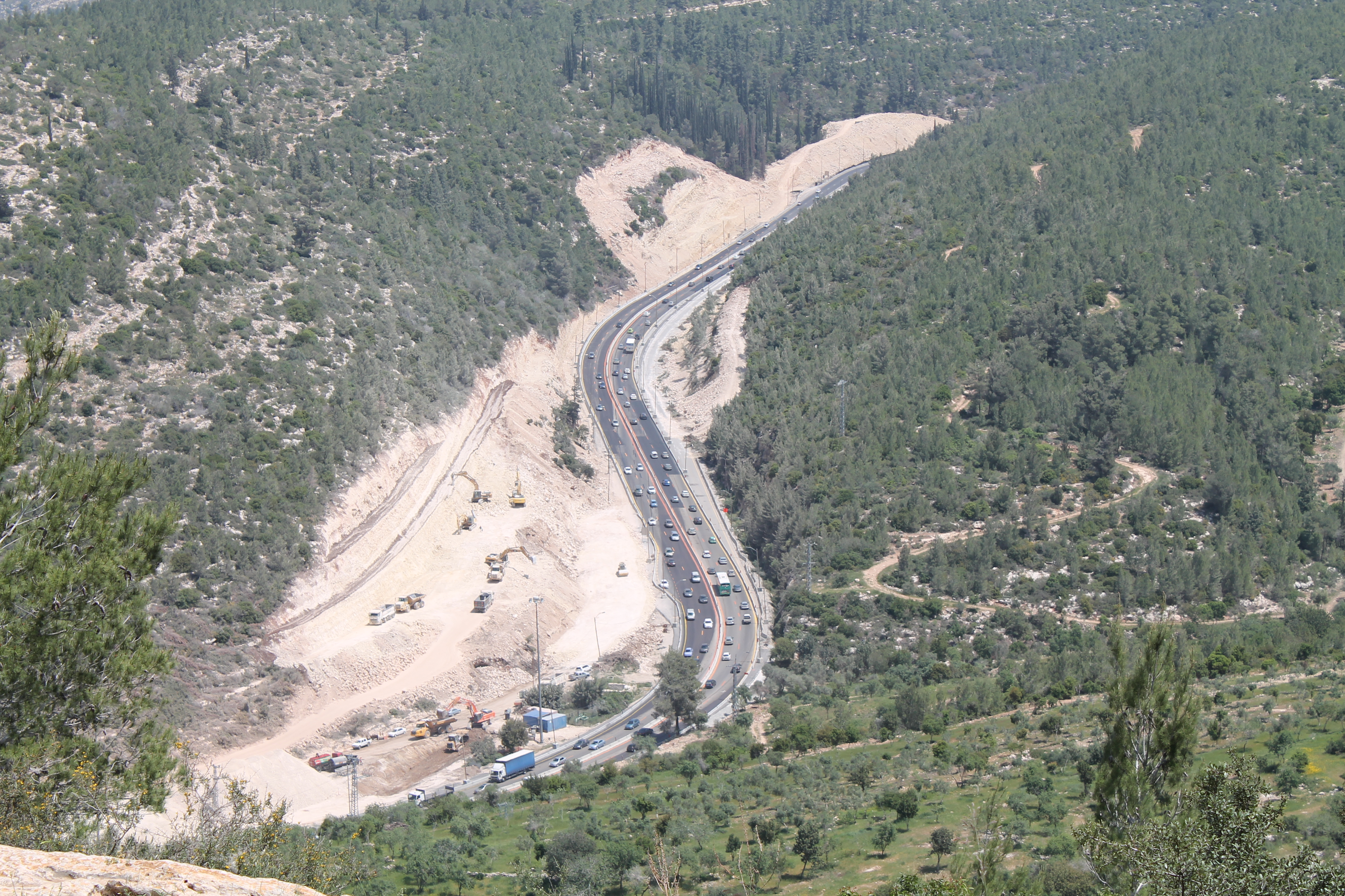 כביש 1 ממשלט המסרק Highway 1 (Israel)